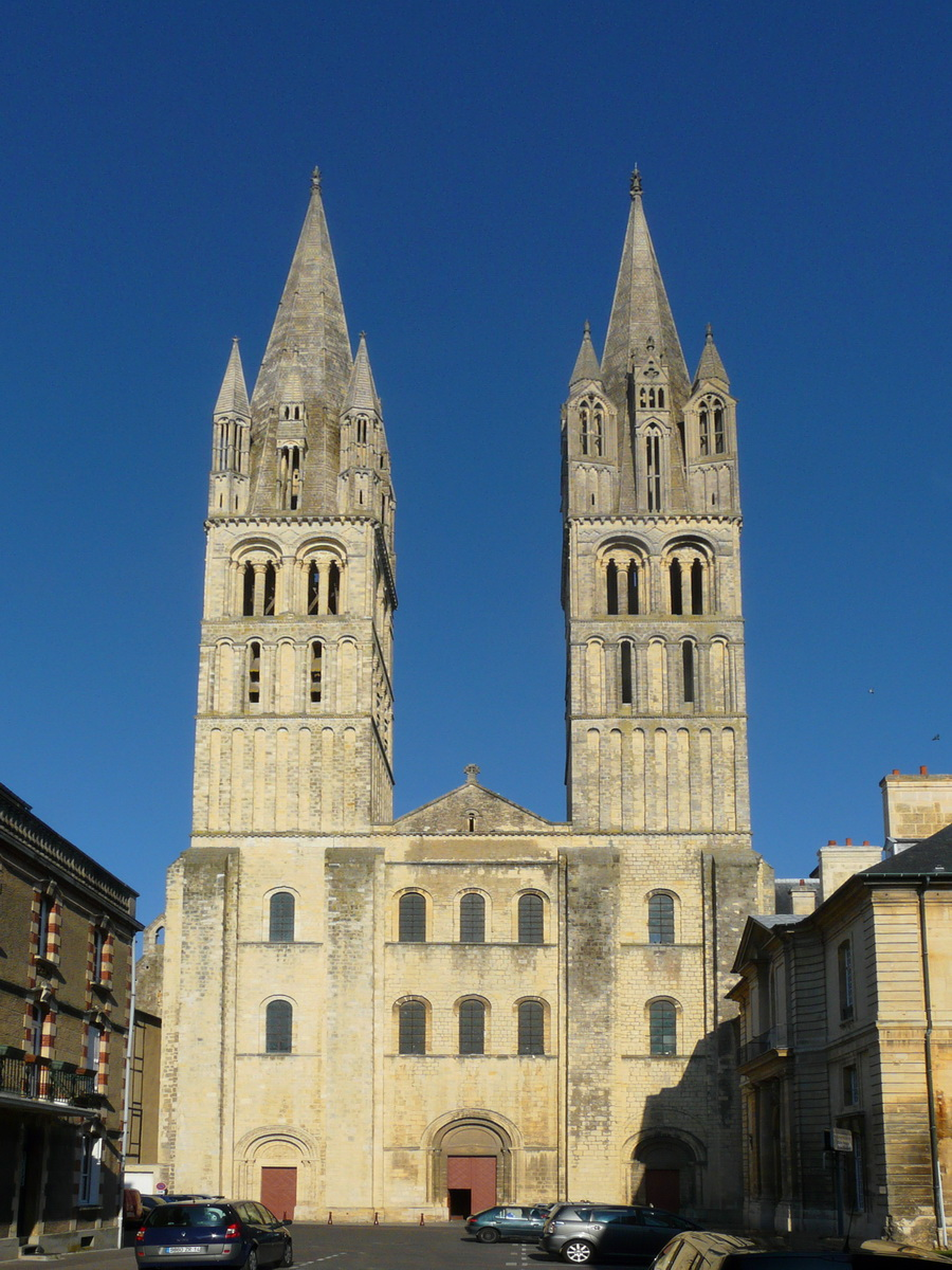 Abbaye aux Hommes, Caen, France